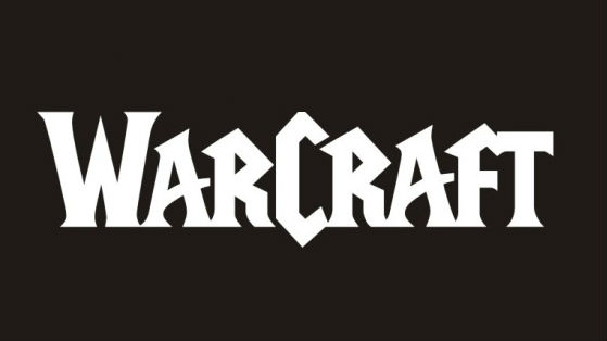 Logo de la película Warcraft